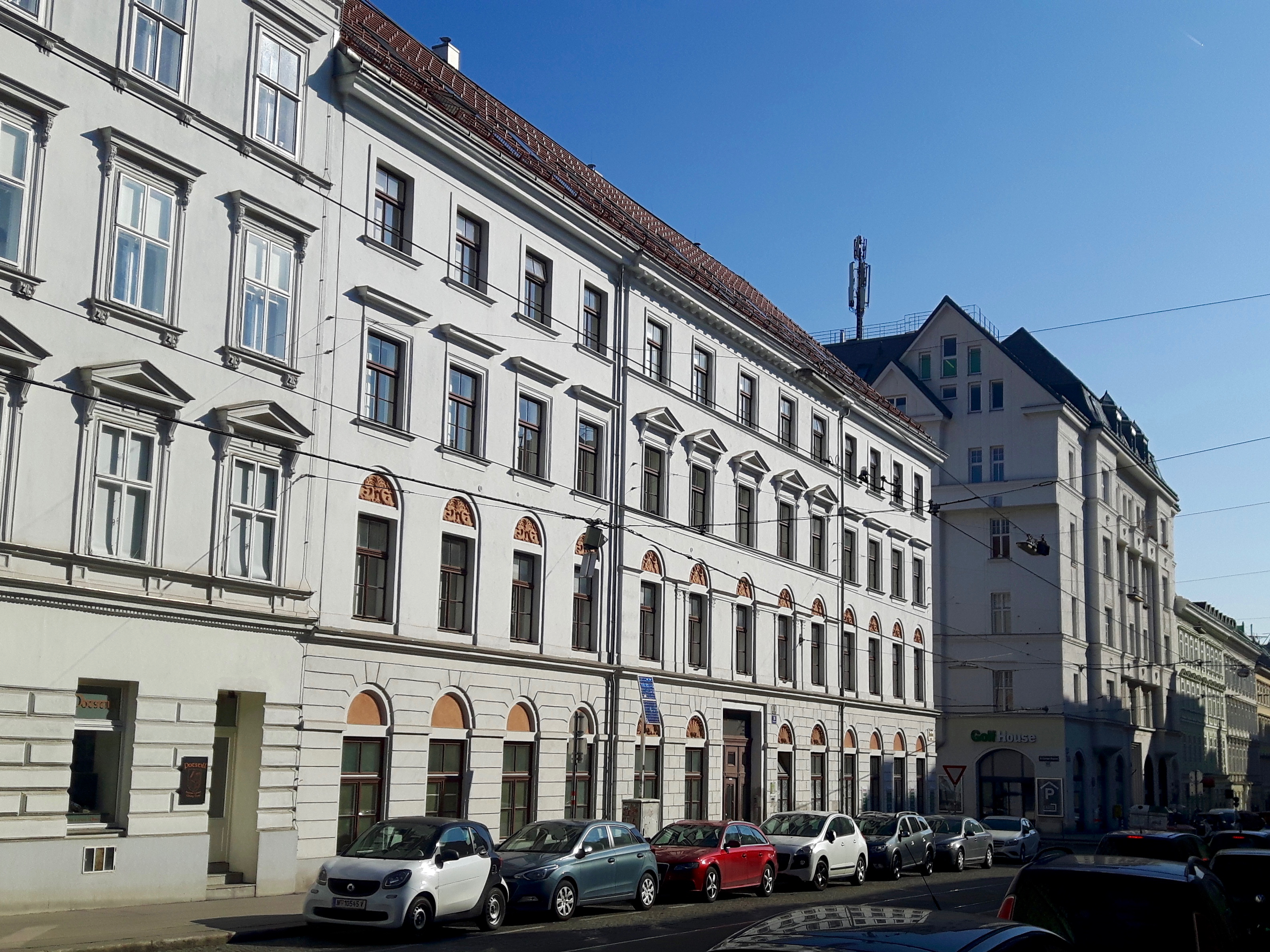 Bürgerhaus Zur Dreifaltigkeit / Haus der christlichen Gewerkschaft. Laudongasse 16 / Lange Gasse 59, Wien-Josefstadt.